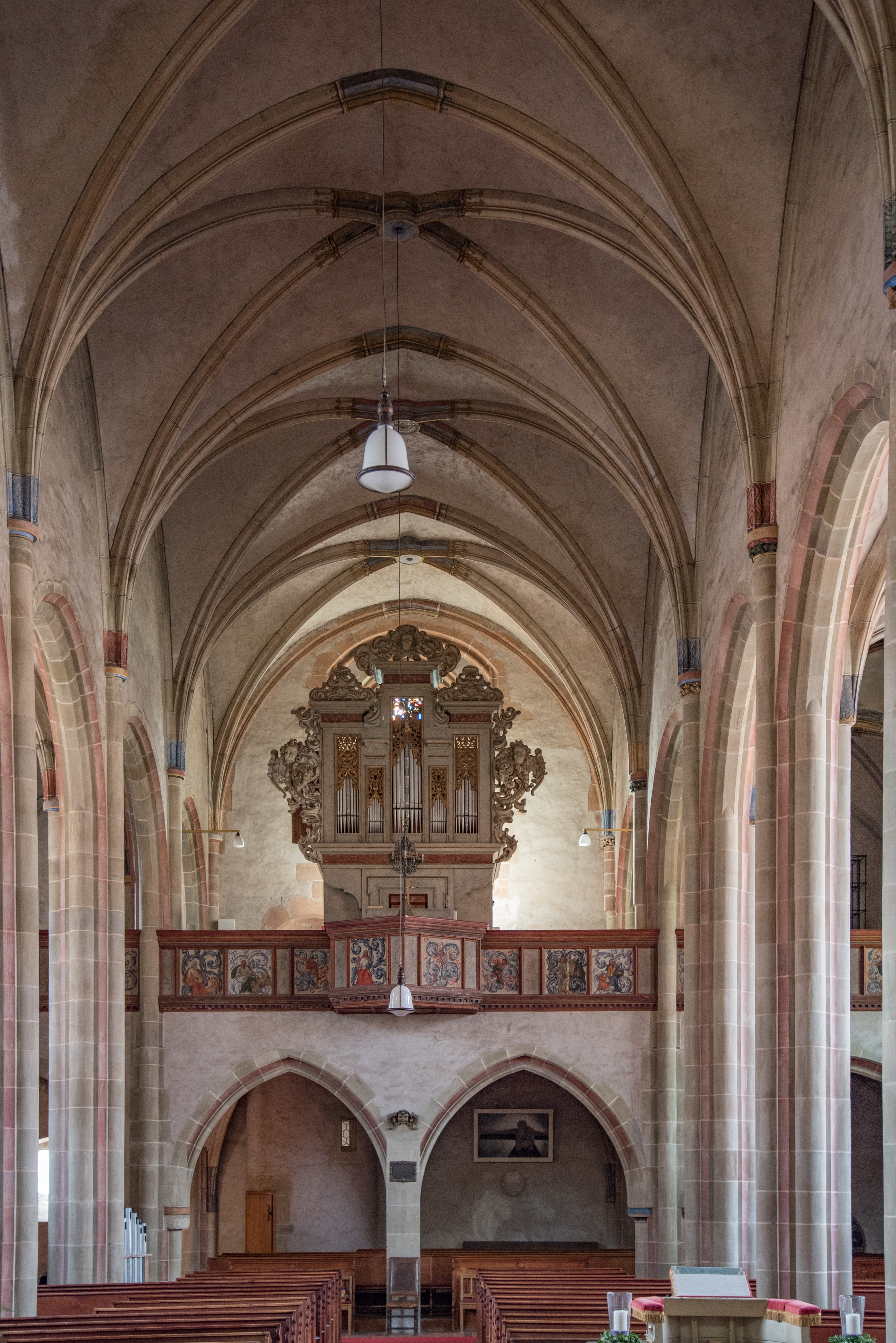 Königsberg in Bayern, Marienkirche